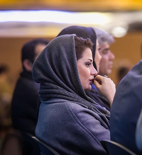 طناز طباطبایی در کنفرانس خبری فیلم ویلایی ها